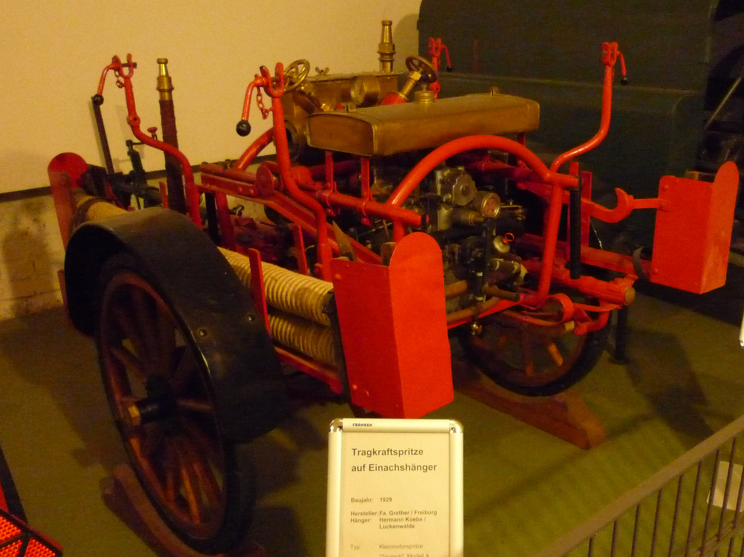 Kleinmotorspritze Triumph (Modell A) von Grether aus Freiburg im Breisgau mit Motor von Breuer aus Frankfurt auf Anhänger von Hermann Koebe aus Luckenwalde aus dem Jahr 1929 im Feuerwehrmuseum Salem. Die Leistung beträgt 600 Liter pro Minute bei 60 m/Ws